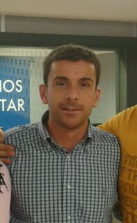 Rubén Martín en marzo de 2012 en los estudios de la COPE.